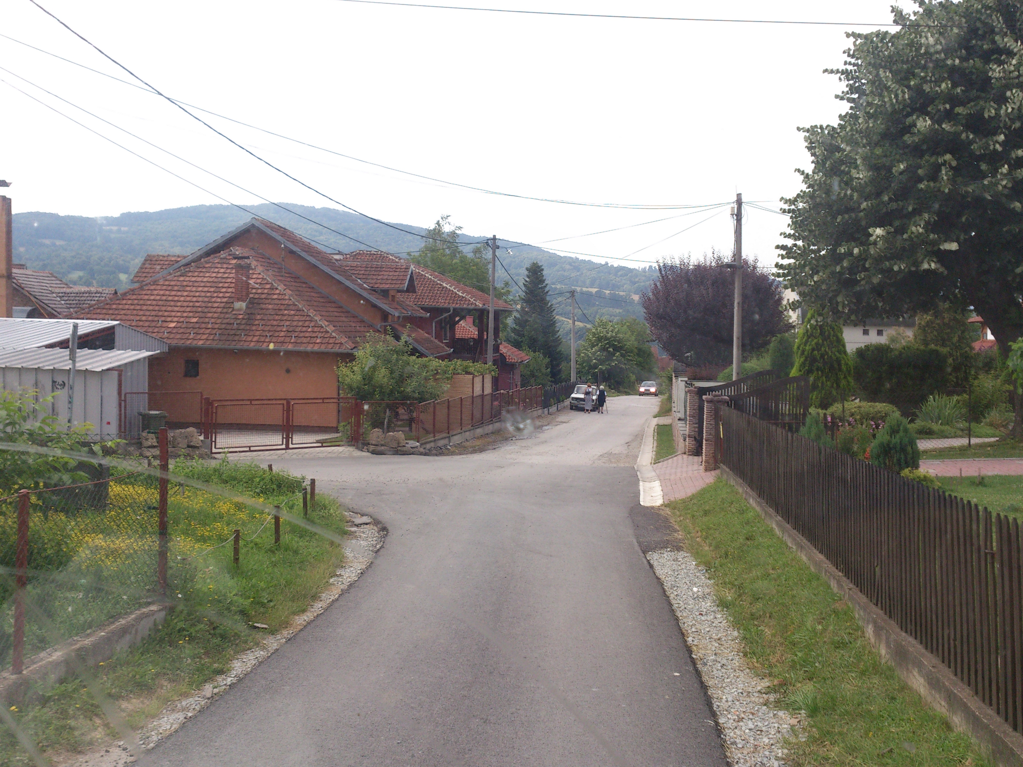 Снимљено при проласку кроз село.